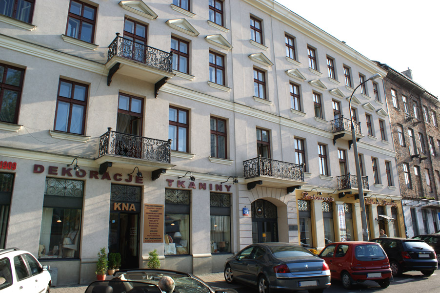 Budynek przy ul. Pańskiej 85 w Warszawie jako kamienica przy ul. Złotej 25 w odc. 1-12.